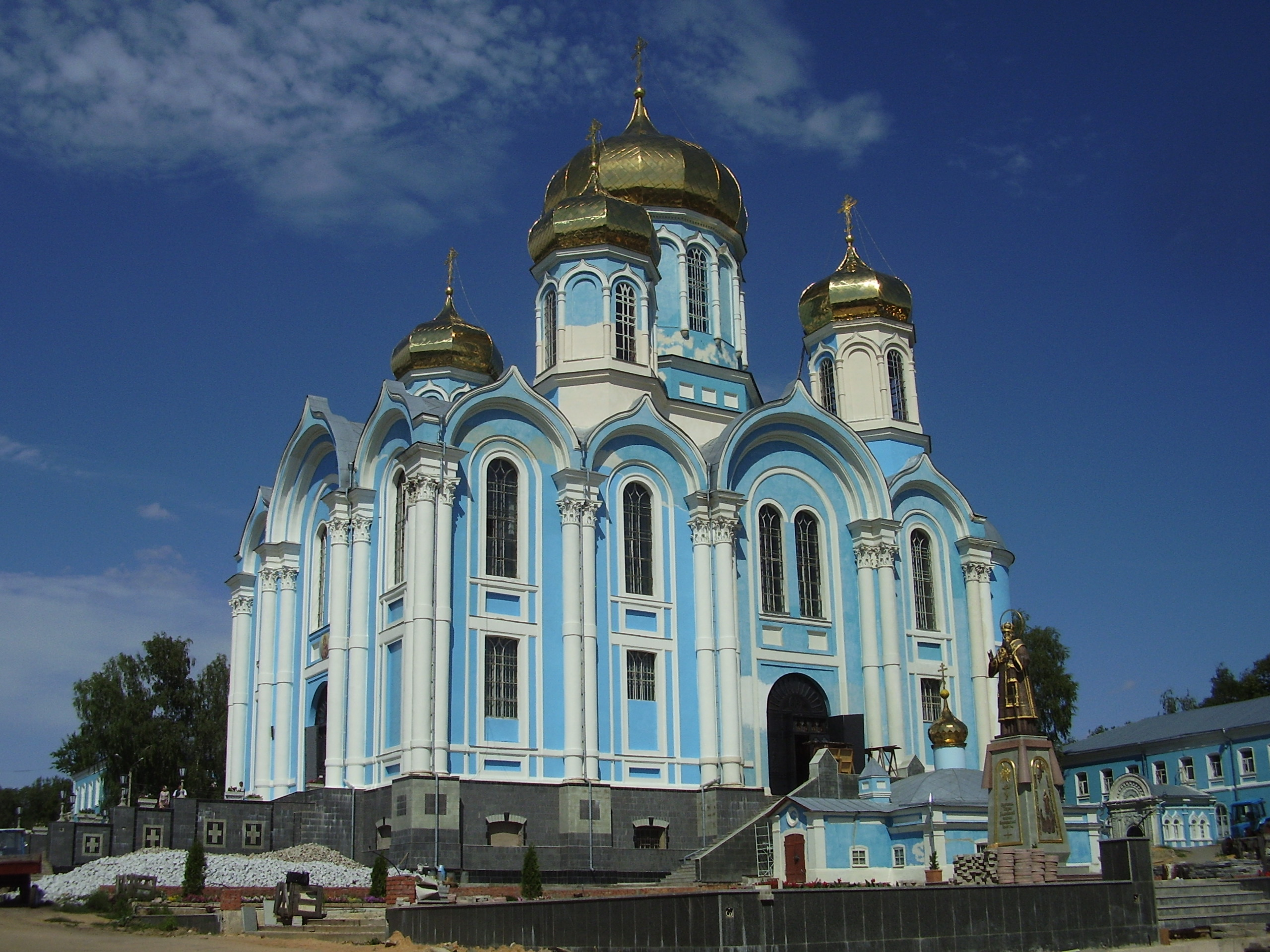 Задонск, Свято-Тихоновский мужской монастырь, Владимирский собор